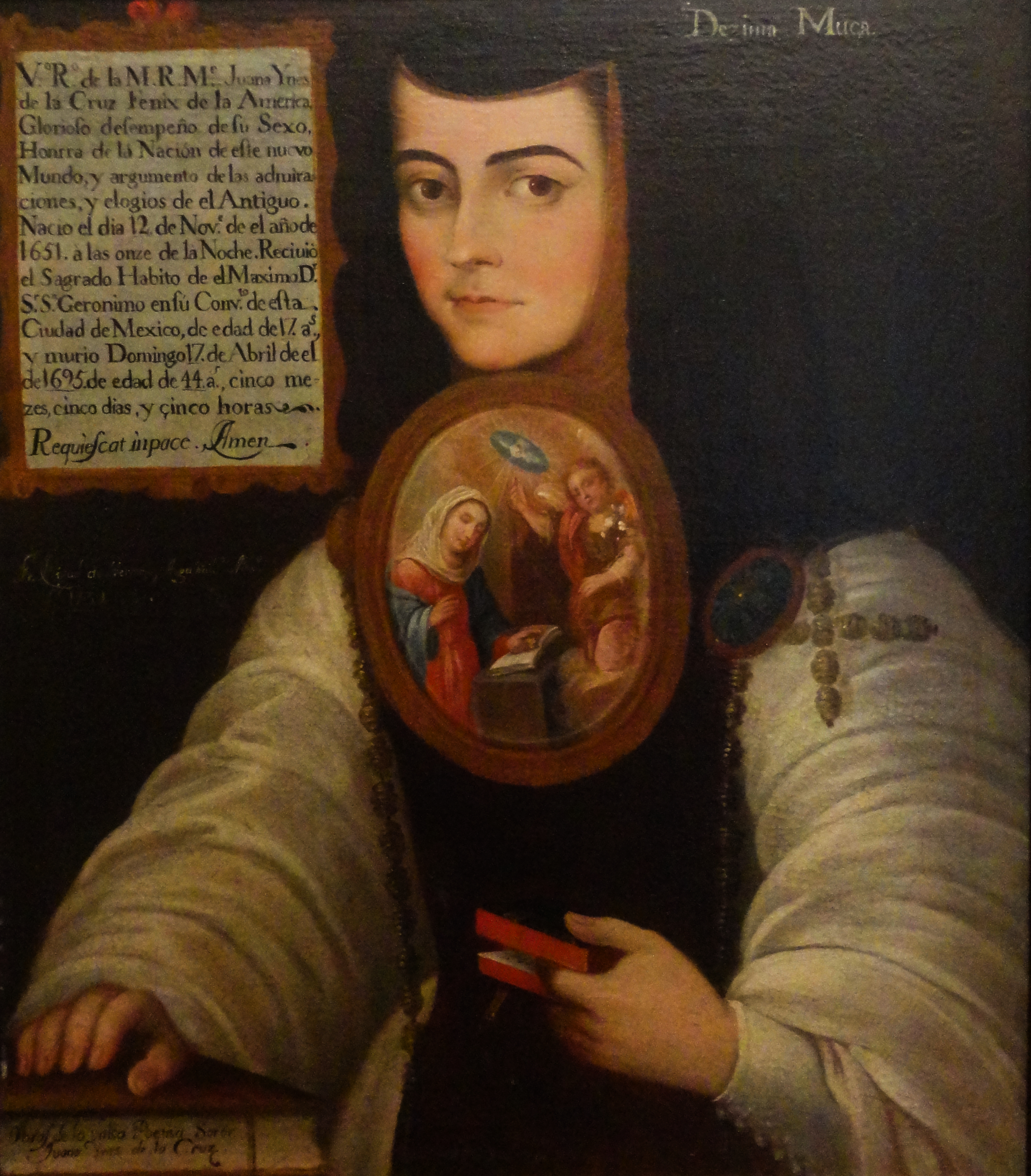 Sor Juana Inés de la Cruz, 1732 - Fray Miguel de Herrera